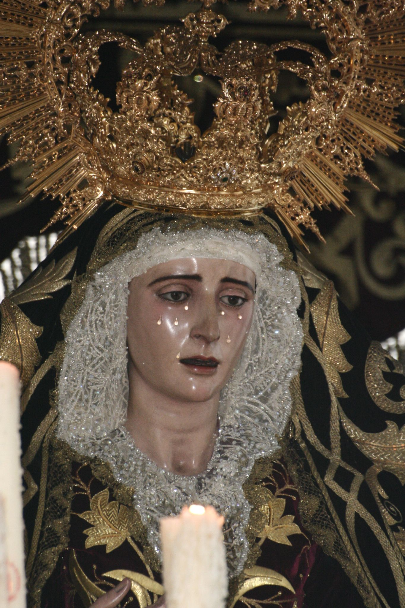 Virgen de los Dolores. Semana Santa en Sevilla. Año 2006 Foto realizada y propiedad de Ángel Cachón